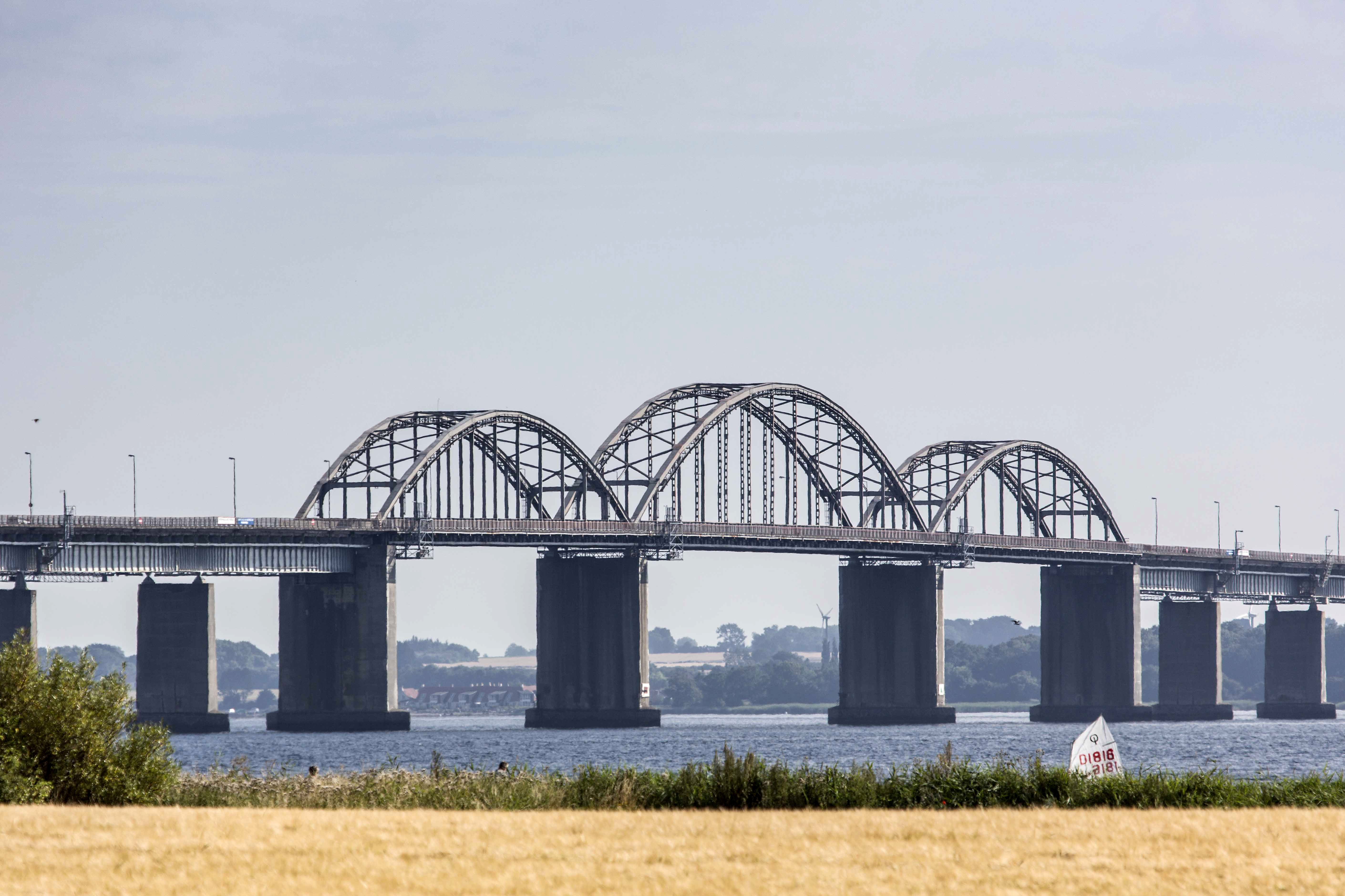 Storstrømsbroen in Denmark EU (Interreg IV A Öresund) och 14 regionala; icke kommersiella aktörer.